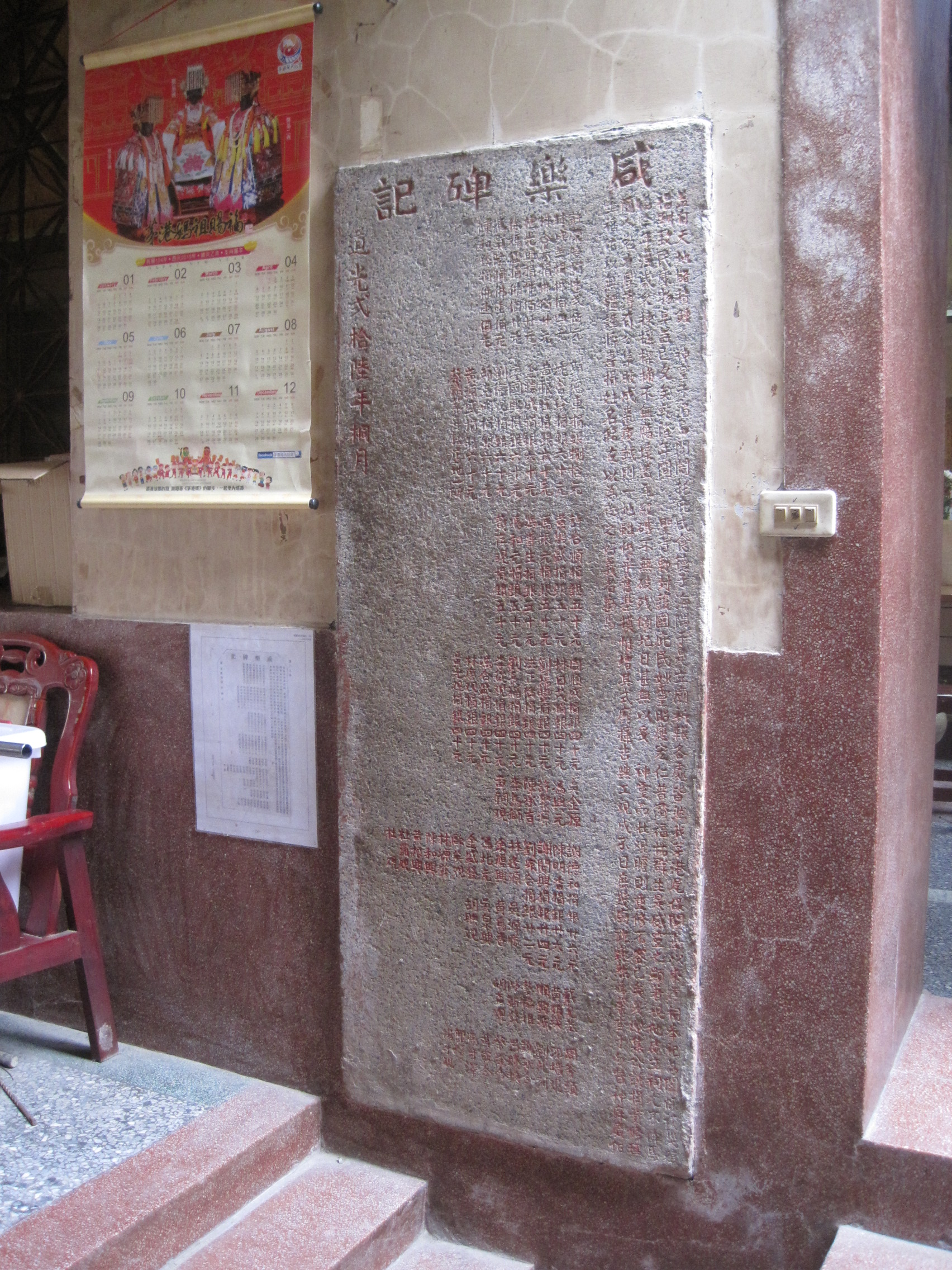 茅港尾天后宮在清道光二十六年（1846年）重修時立的石碑